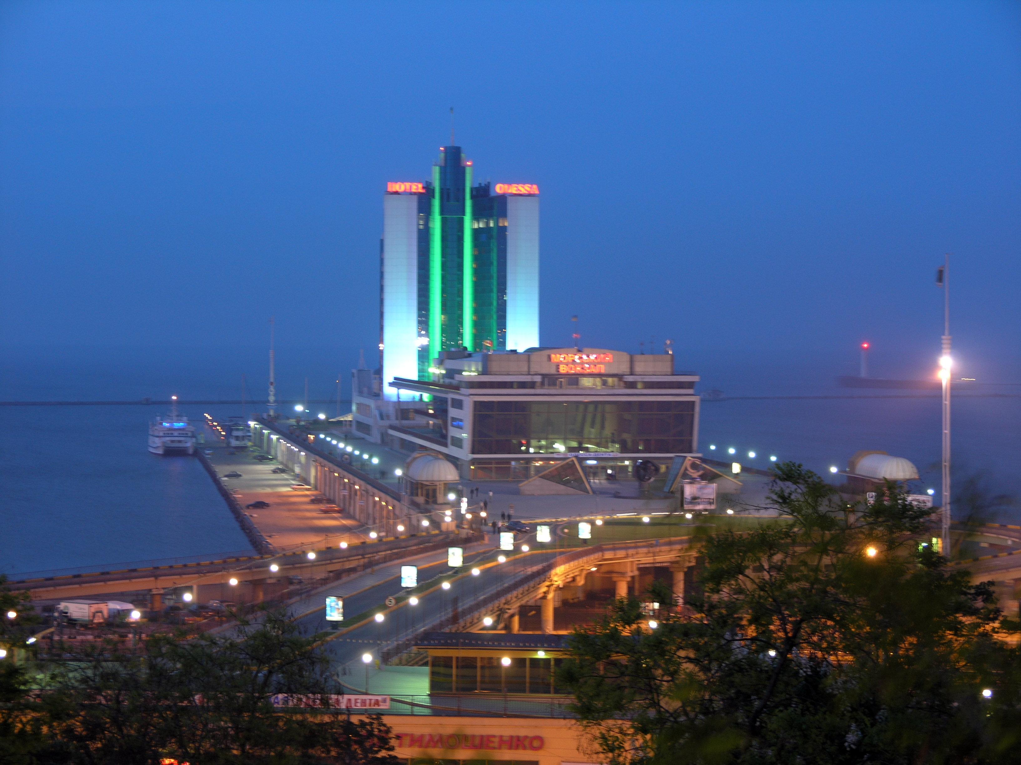 Україна, Одеса - територія Морського вокзалу, де відбулося закладання перших споруд, які поклали початок будівництву порту і міста Одеси та відбулося повстання французьких військових моряків